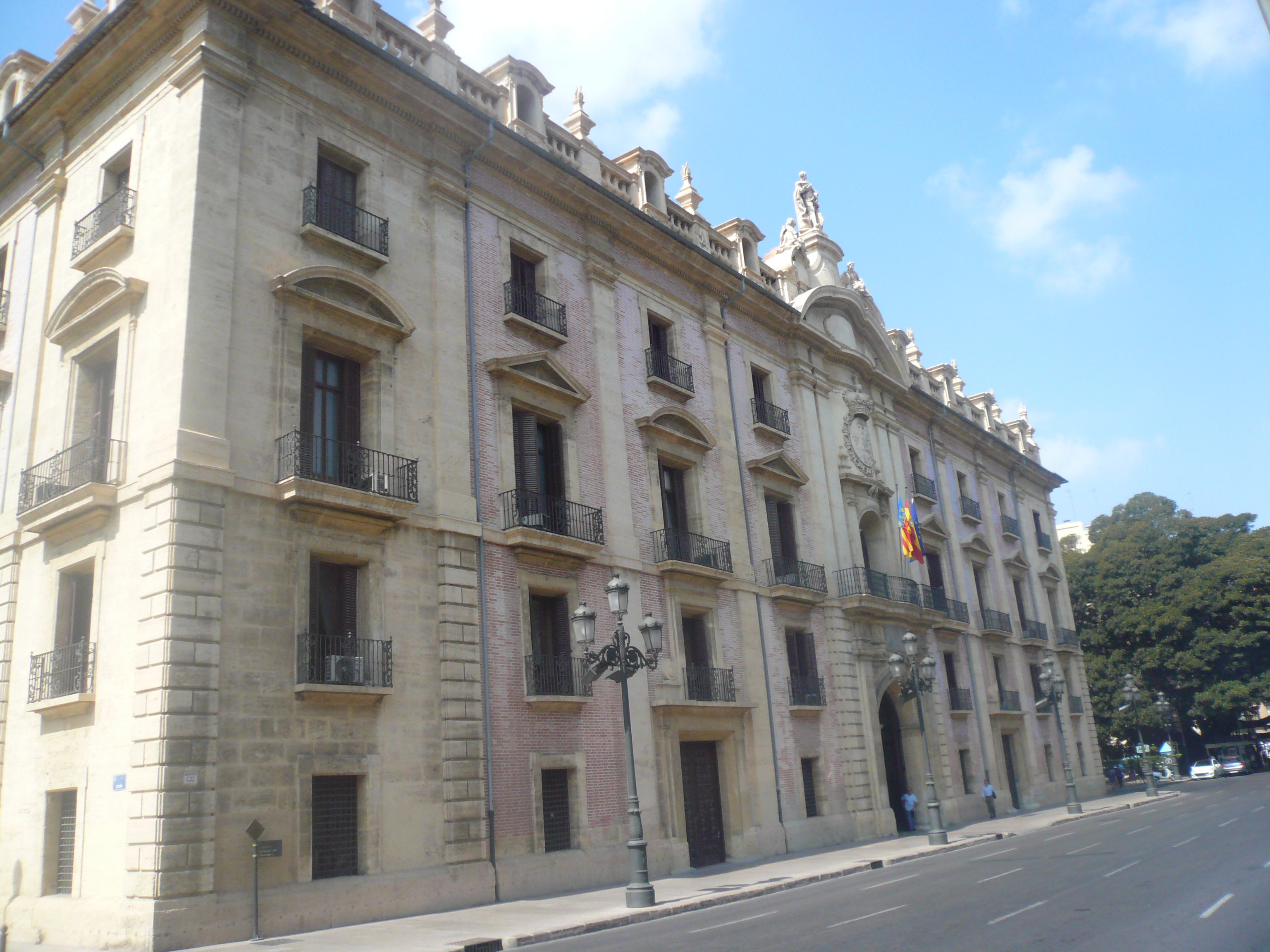 Palau de Justícia (València) Object location39° 28′ 19.1″ N, 0° 22′ 11.13″ W